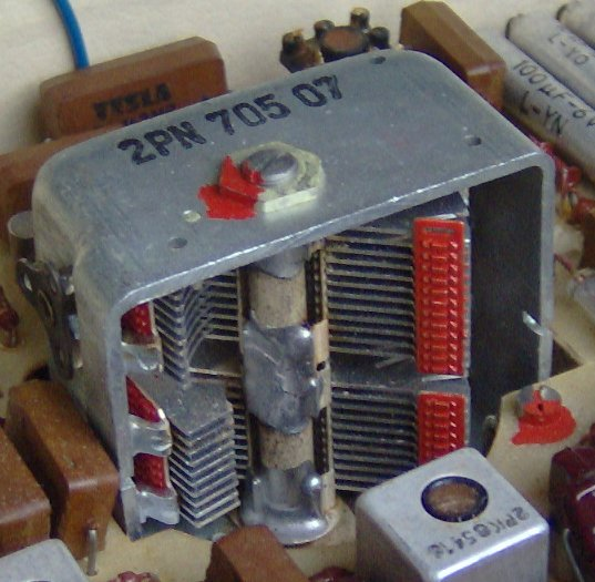 Electronic component - variable capacitor in an older tuner